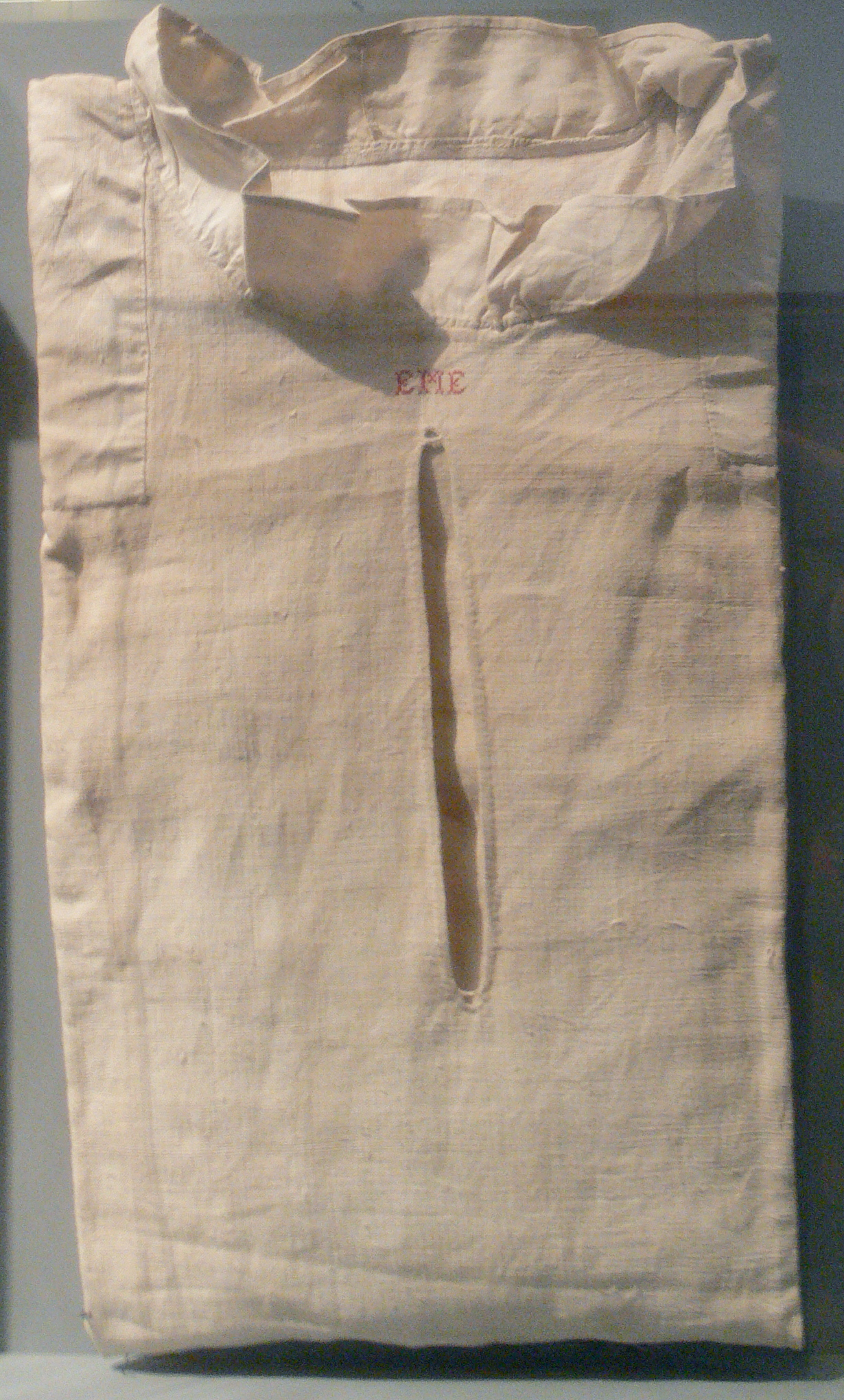 Frauenhemd mit Stillschlitz, Leinen handgenäht, Württemberg 19. Jahrhundert Landesmuseum Württemberg (Außenstelle Museum für Volkskultur in Württemberg, Waldenbuch) 1.10, Inv. Nr. VK 1971/177